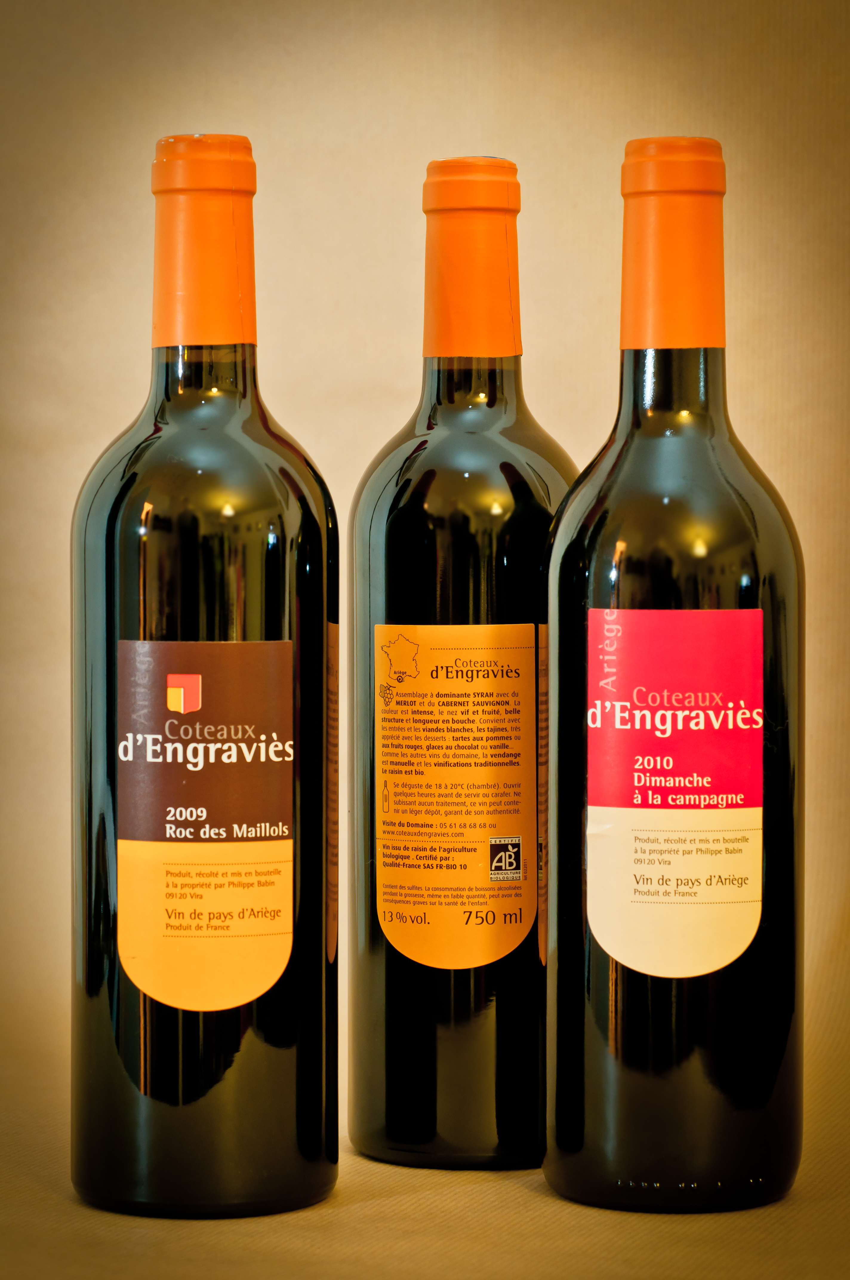 Deux exemples de "Vin du pays d'Ariège" (Indication Géographique Protégée) : "Roc des Maillols" et "Dimanche à la campagne", créations de Philippe Babin sur le domaine des côteaux d'Engraviès (Commune de Vira)